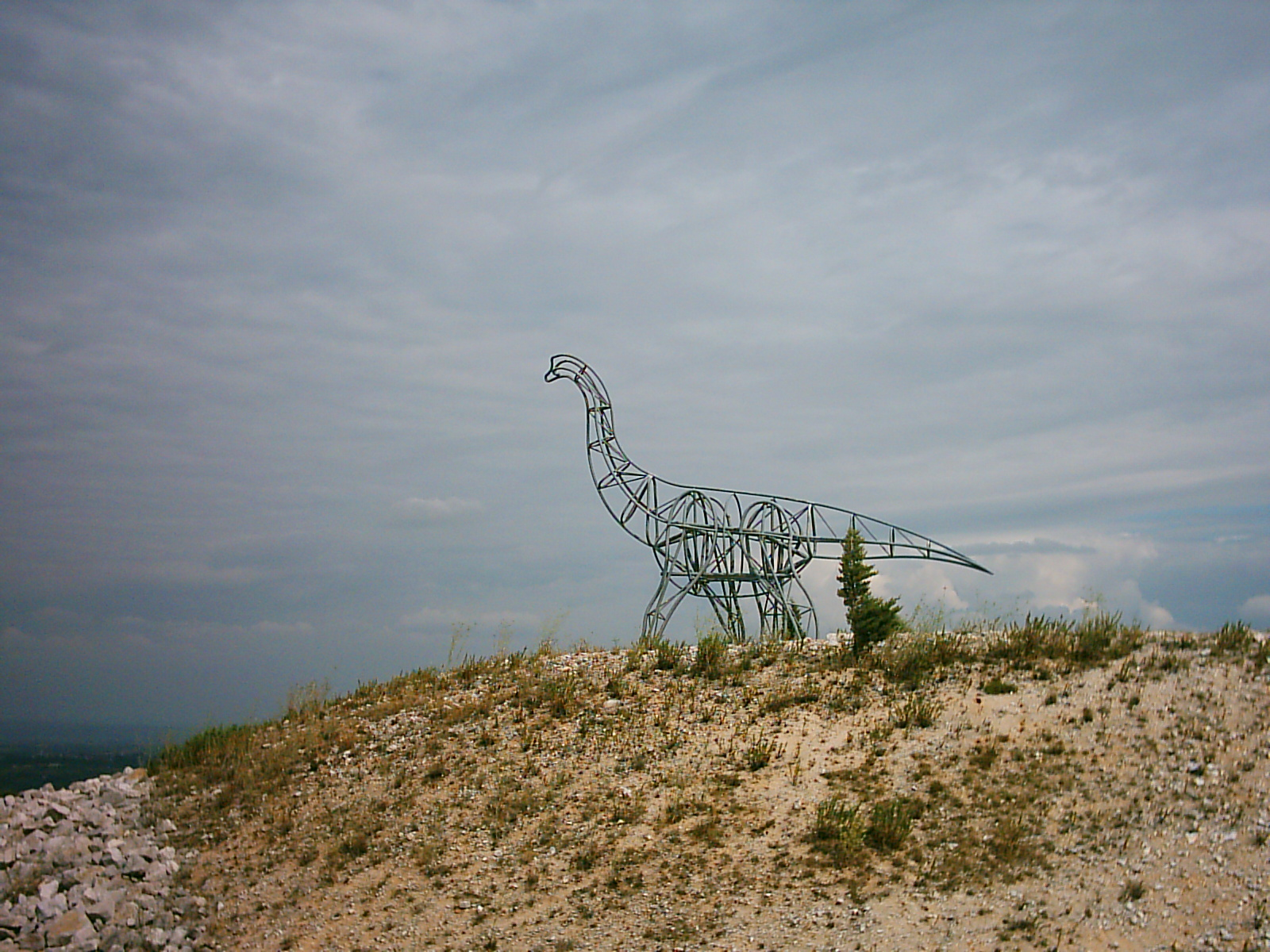 Aramossáurio, cartão de visita do parque das Pegadas da Serra de Aire